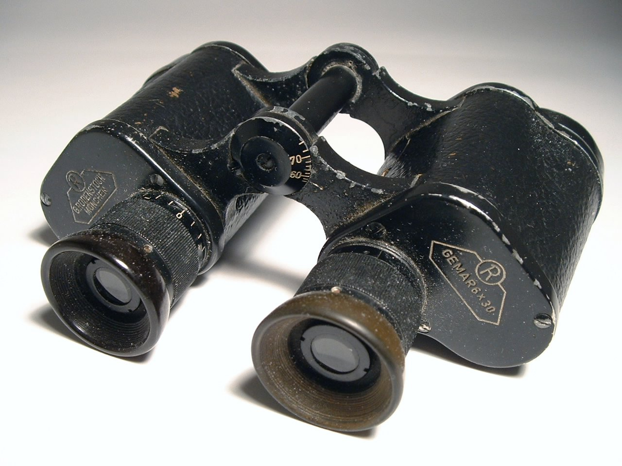 Paire de jumelles. / Binoculars